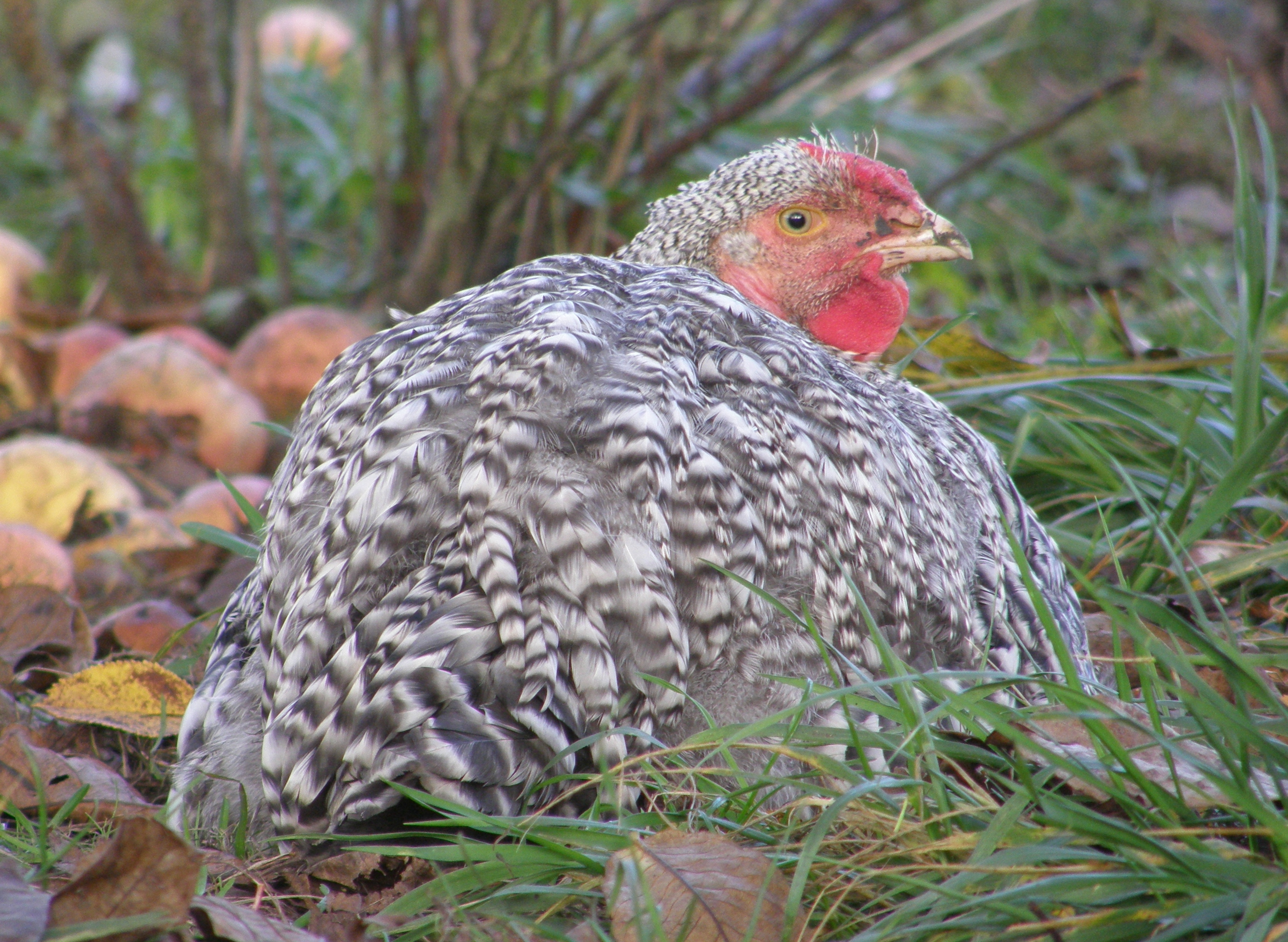 Poule de race "Coucou d'Izegem"